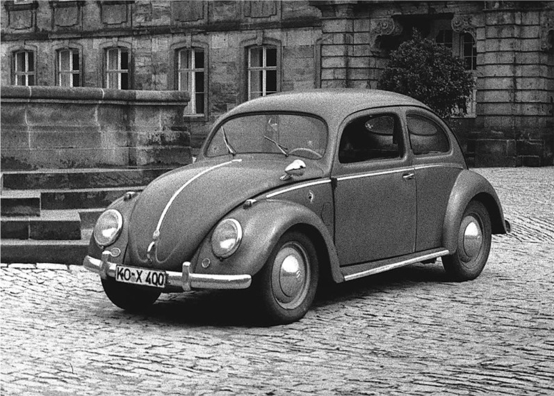 VW Export, Bj. 1951 in Bayreuth. Nicht original: Stoßstange und Ziergitter auf dem rechten Kotflügel [beides vom Baujahr 1952], Blinker und Talbot-Spiegel. Einen serienmäßigen Außenspiegel gab es ab Oktober 1956.